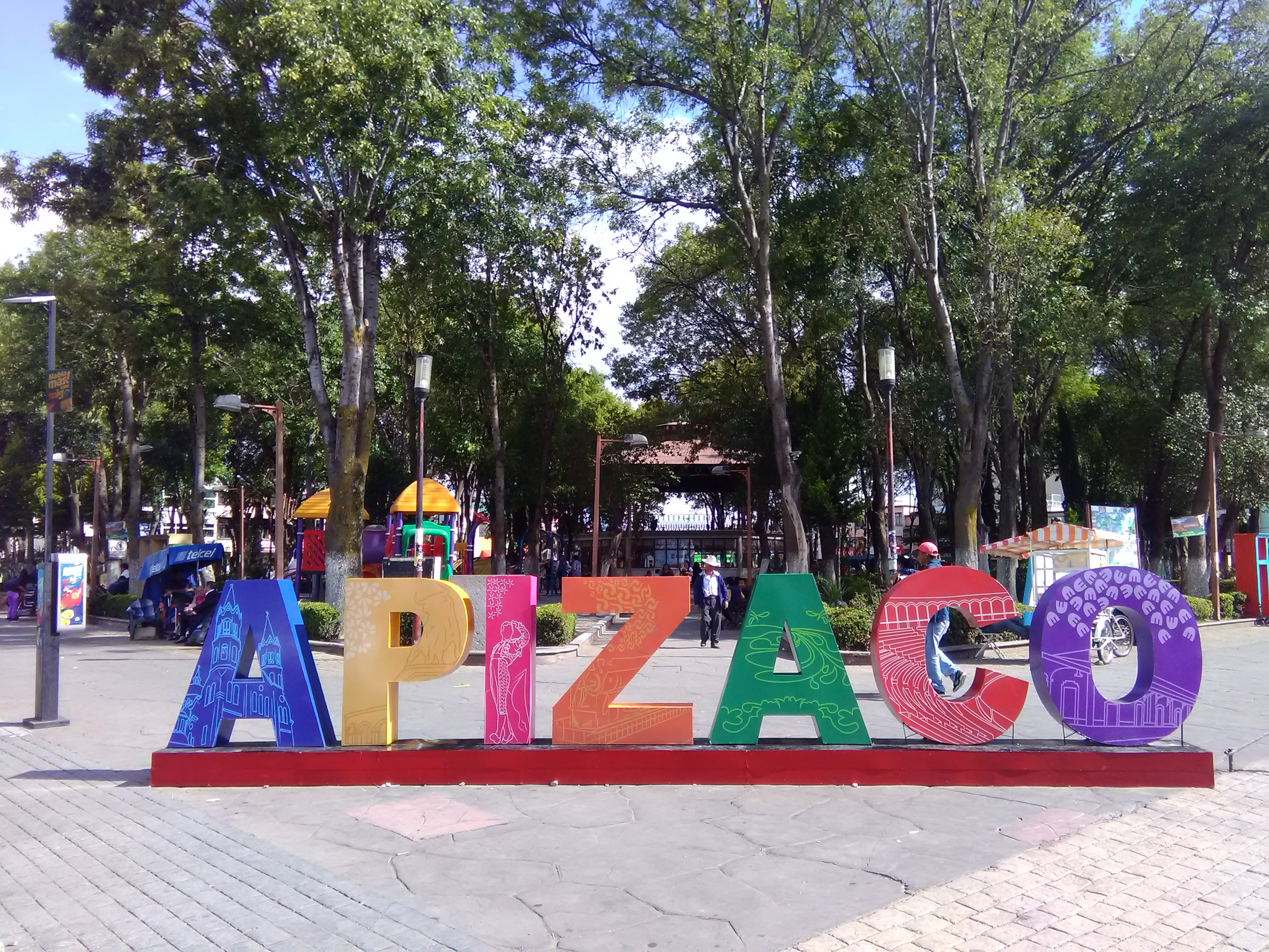 Zócalo de Apizaco